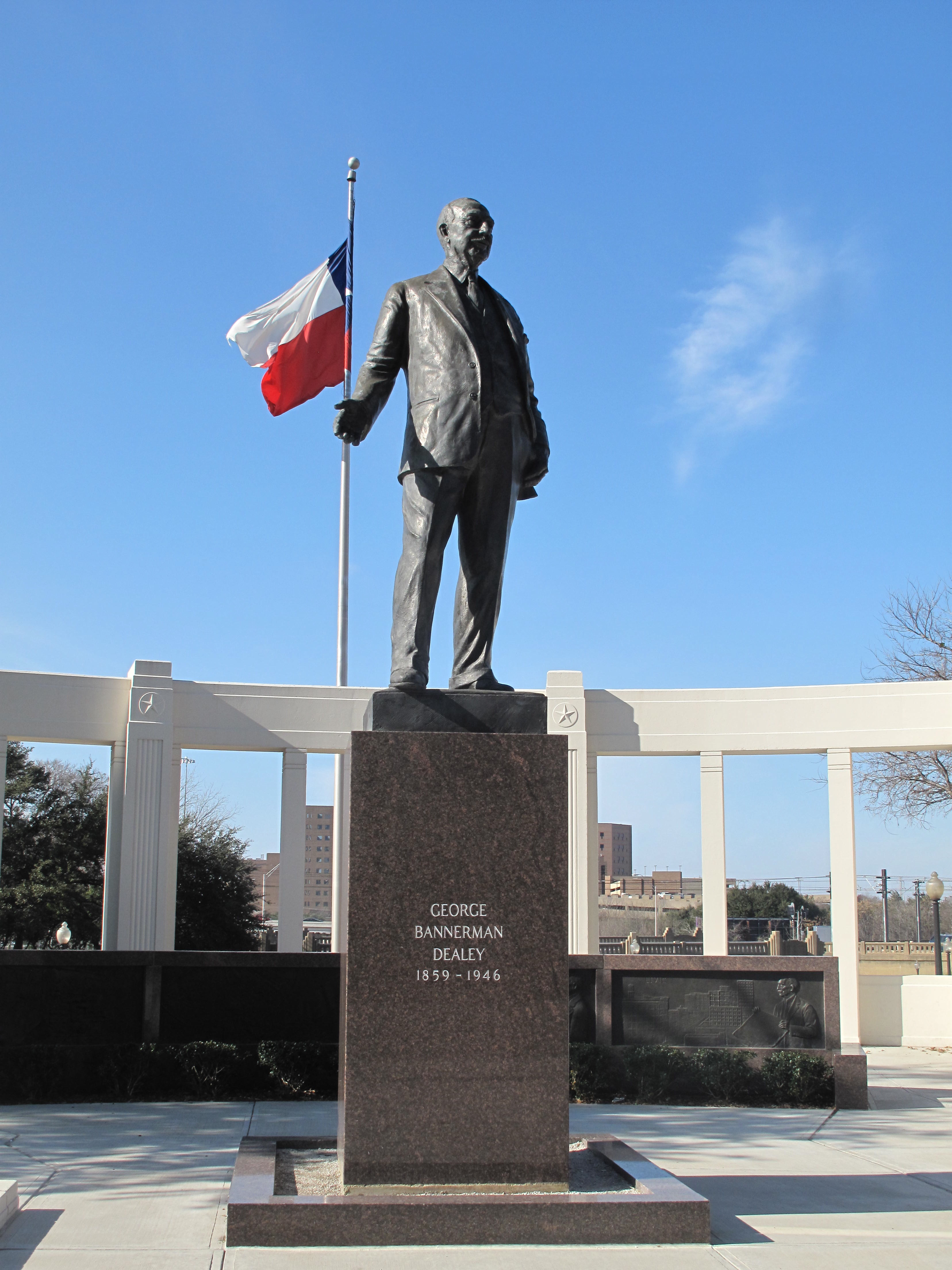 Dallas - 05